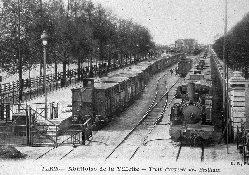 Train de bestiaux aux abattoirs de la Villette à Paris, France.